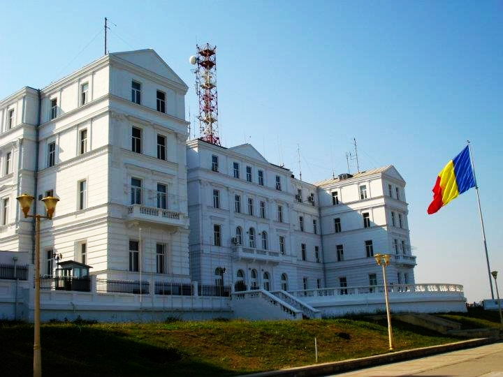 Sediul Comandamentului Marinei Militare